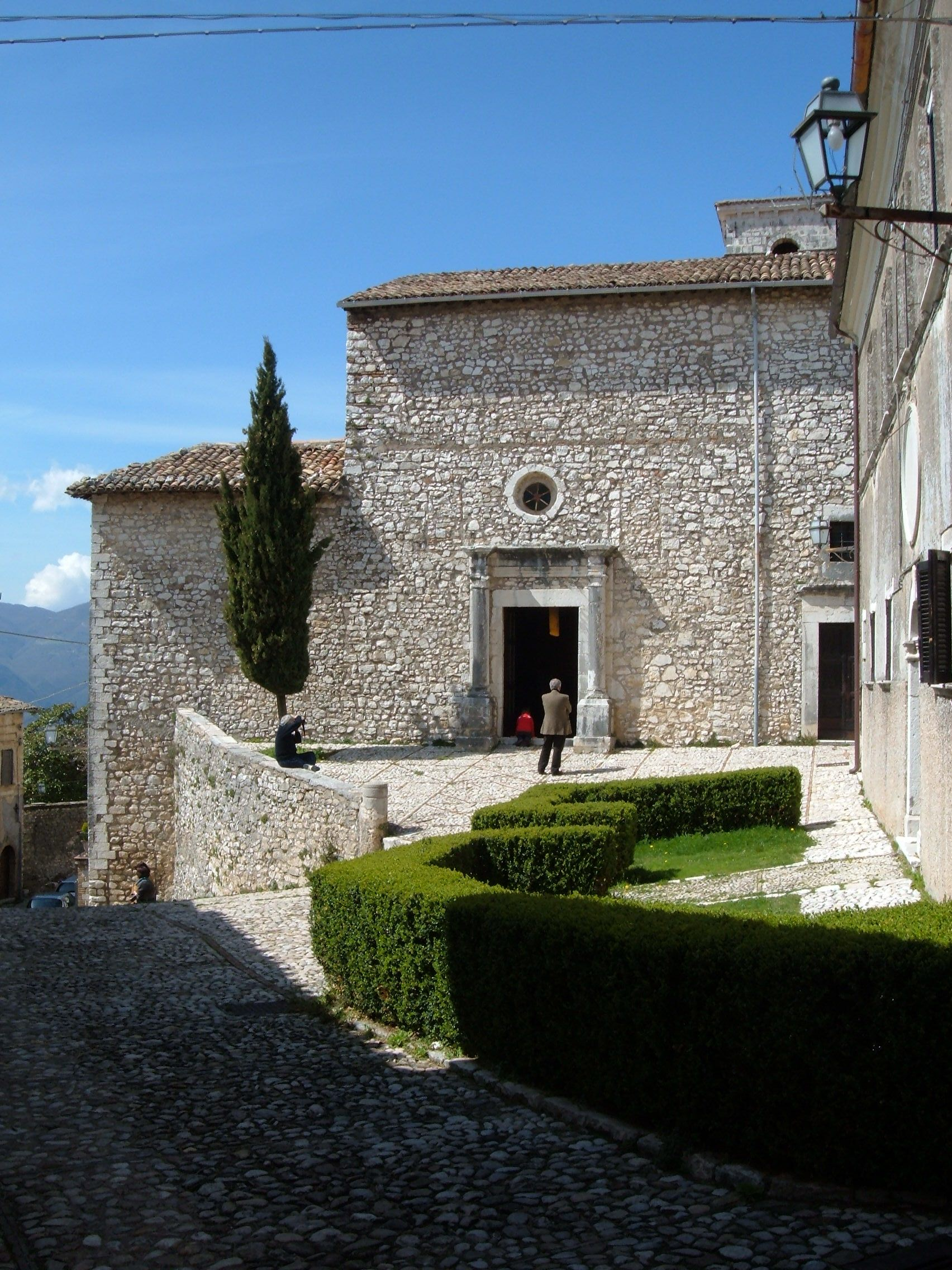 Chiesa di Santa Maria Maggiore, in Labro (provincia di Rieti).